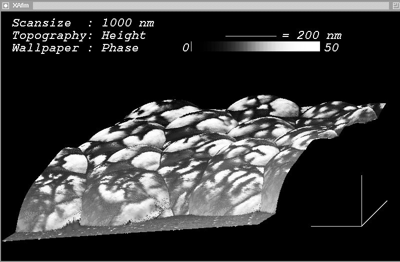 Rasterkraftmikroskopische Aufnahme eines schwach vernetzten P(BA/EA)-Latex mit Inklusionen aus (mit etwas DVB vernetzten). Das Bild wurde im "Tapping-Mode" aufgenommen, die harten, bis an die Oberfläche reichenden Inklusionen sind durch die unterschiedliche Phasenlage des Signals sichtbar.